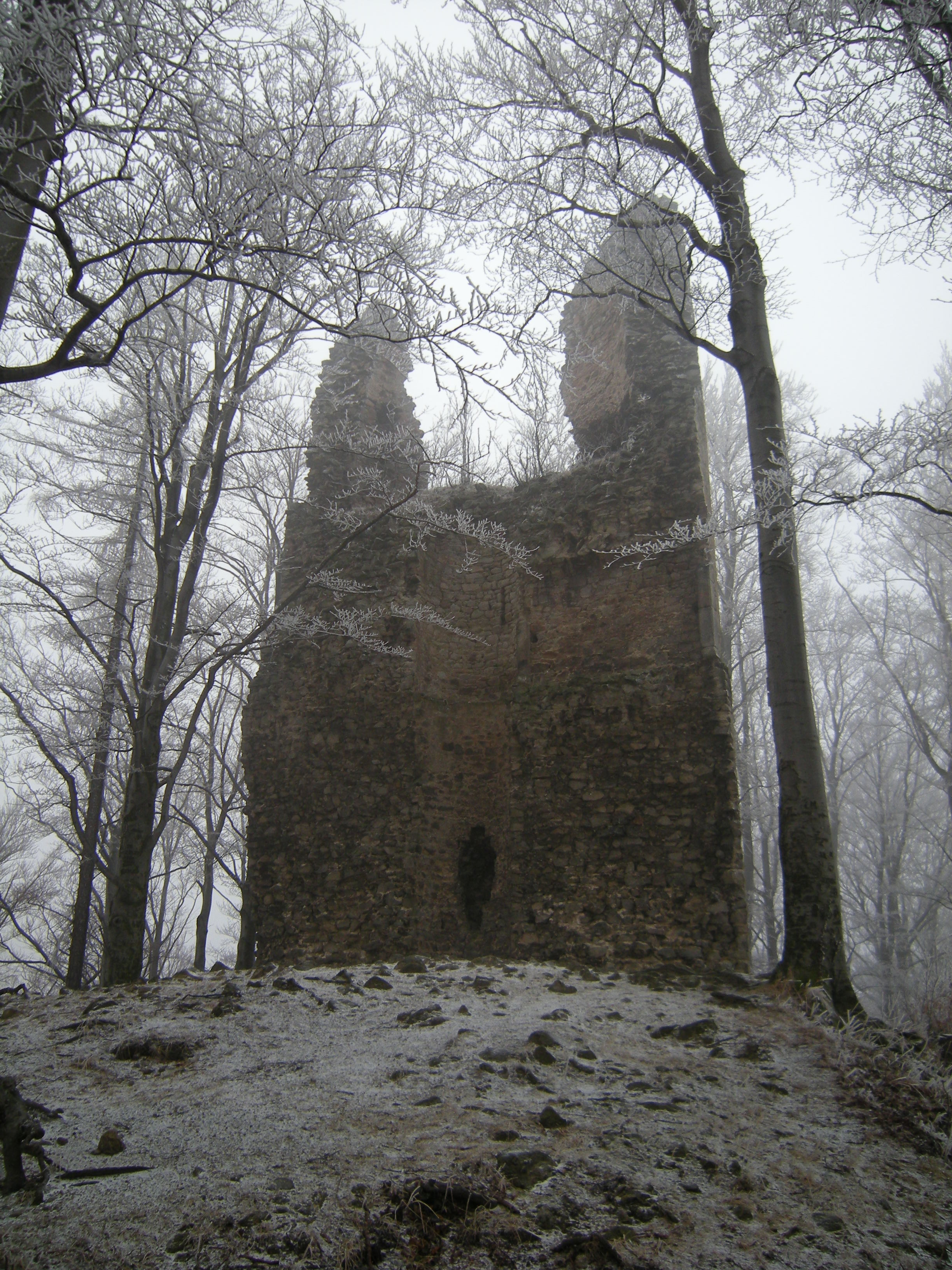 Ruiny zamku Kaltenštejn w pobliżu miejscowości Černá Voda (powiat Jeseník) w Czechach